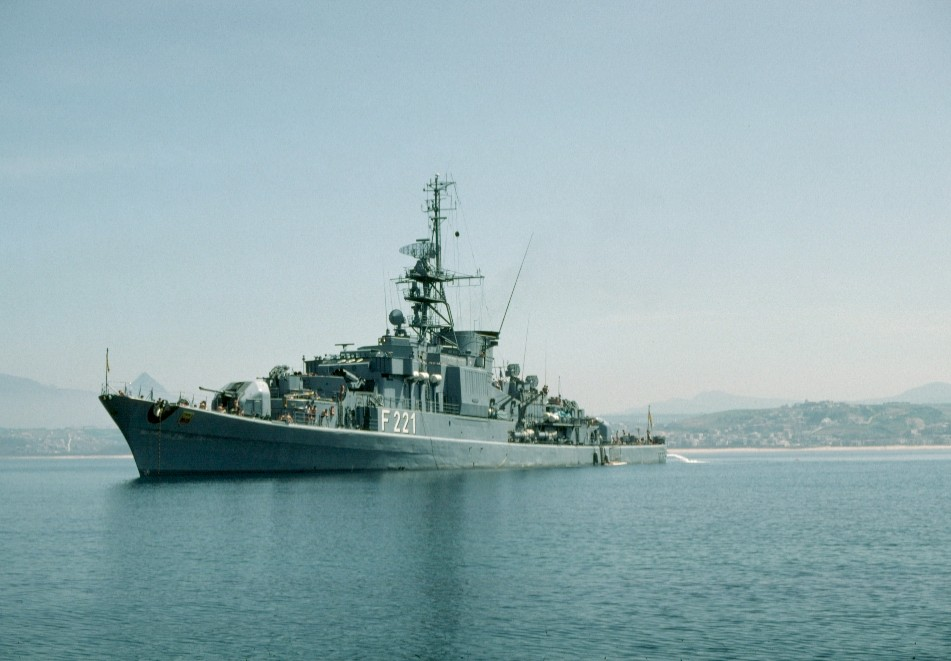 Fregatte EMDEN IV (F221) am 10.04.1983 im Golf de Castellammare